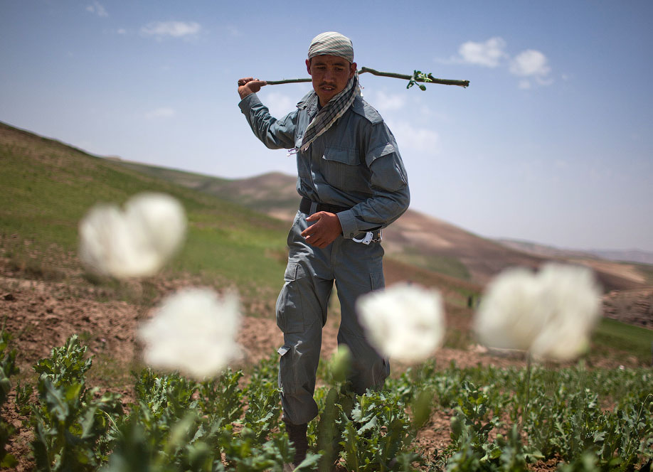 Уничтожение маковой плантации в Афганистане